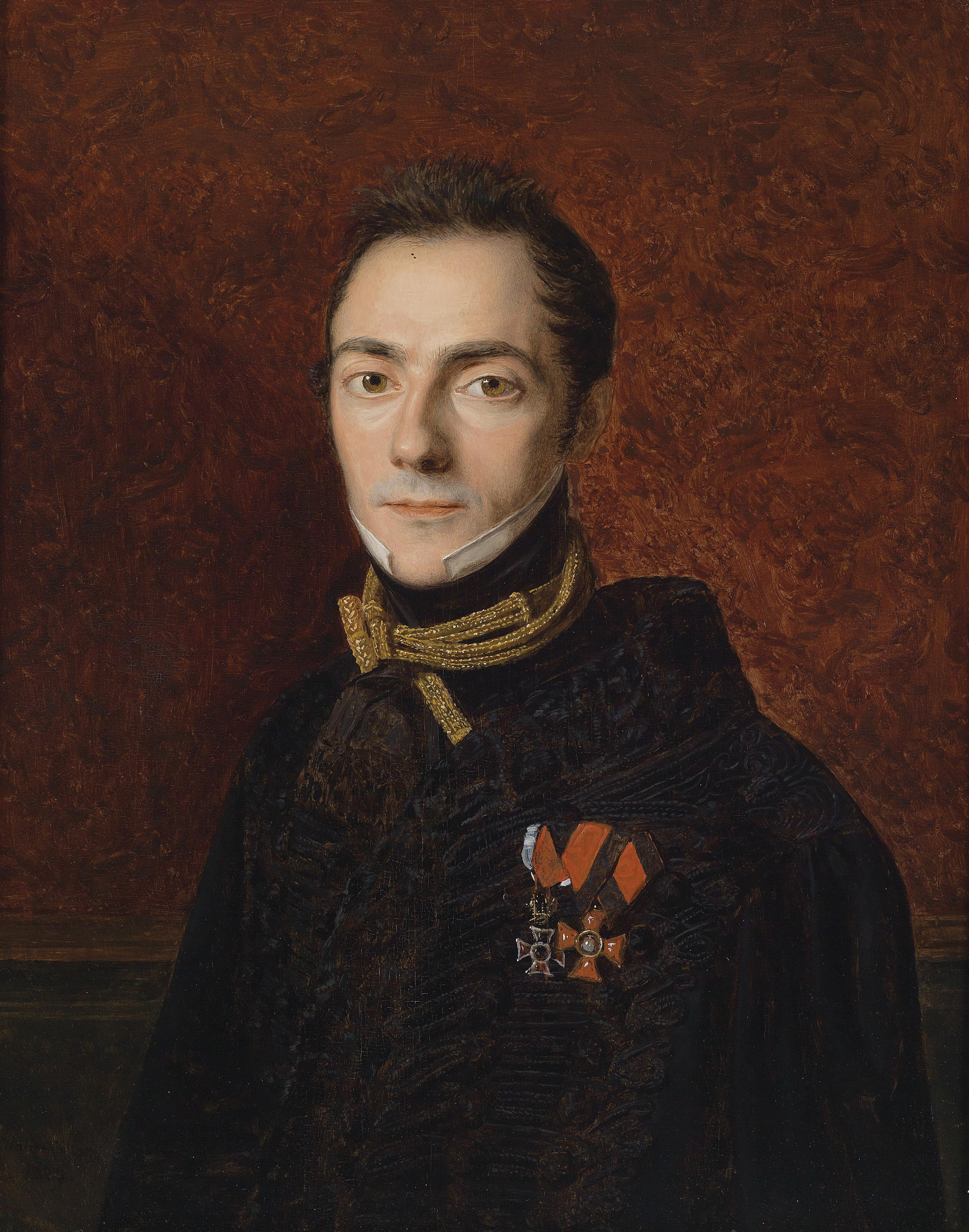 Portrait eines Grafen Apponyi (?)